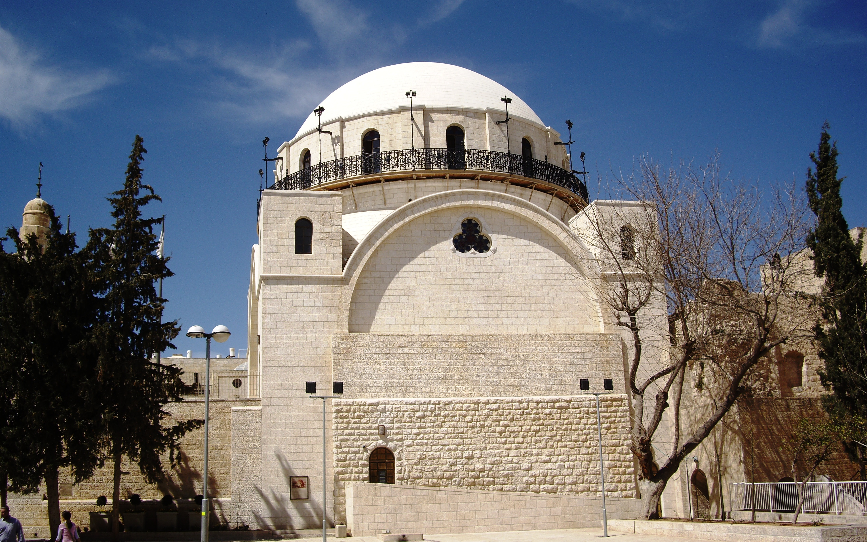 HaHurva Synagogue בית הכנסת החורבה